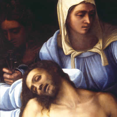 Sebastiano del Piombo, Piedad (detalle), Museo del Prado (Madrid)